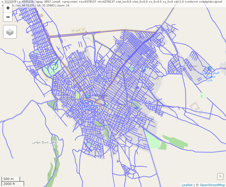 کوردی: تۆڕی ڕێگاکانی هەڵەبجە لە نەخشەکانی ئۆ ئێس ئێم